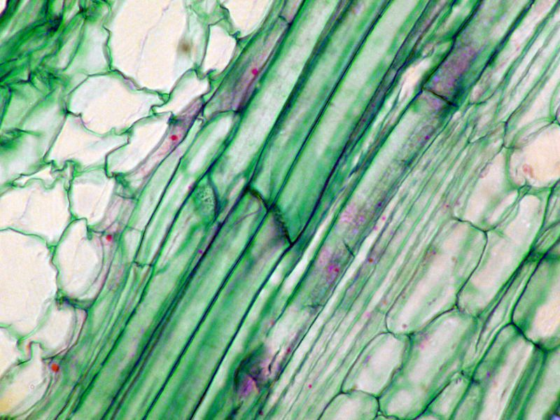 Floema (elemento de tubo crivado) com crivos (PLACA CRIVADA); não possui fibras.